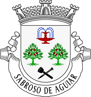 Brasão da freguesia de Sabroso de Aguiar (concelho de Vila Pouca de Aguiar)